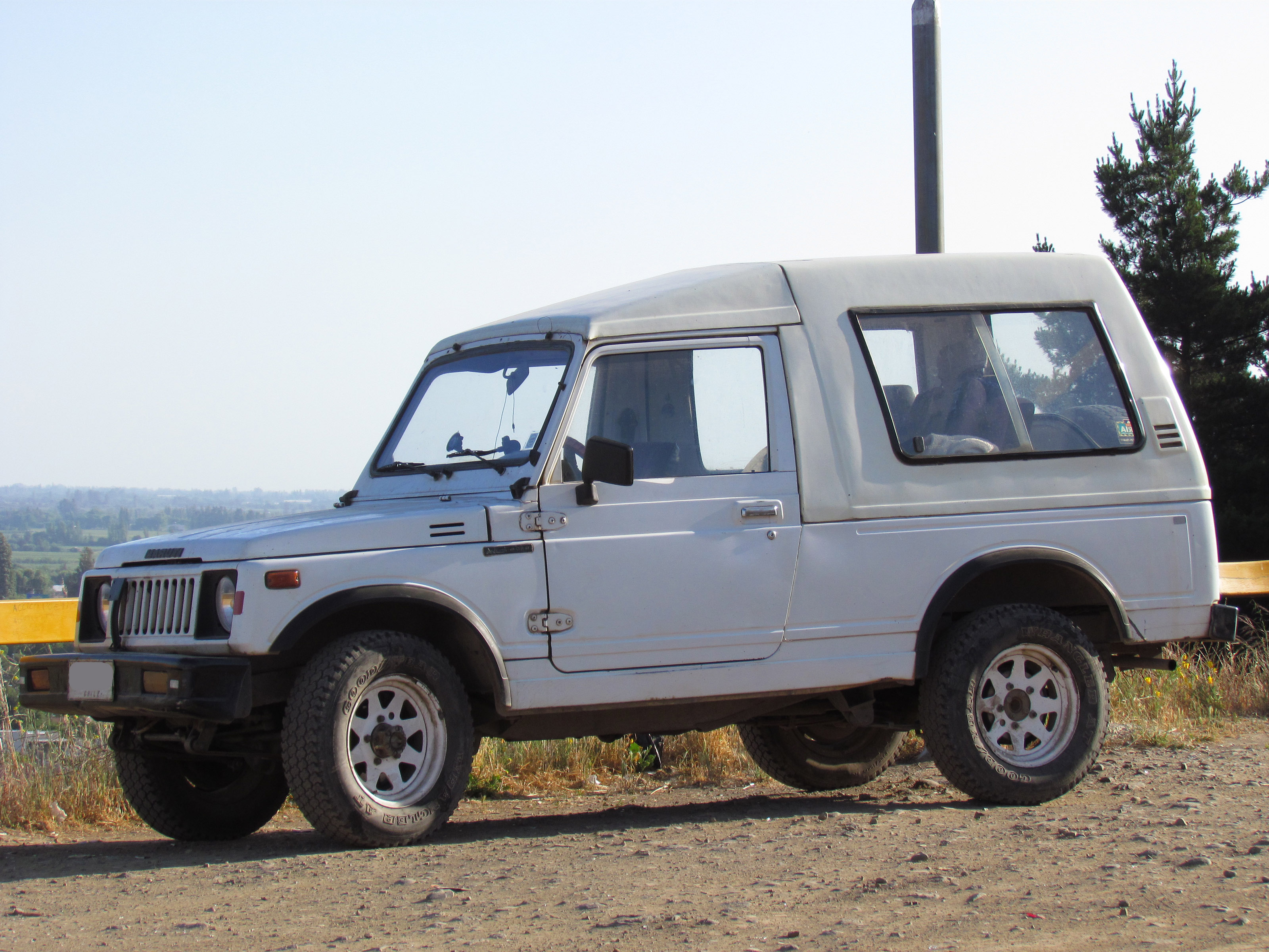 Maruti Gypsy MG 410 1992